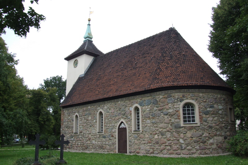 Dorfkirche in Berlin-Reinickendorf Fotograf: Harald Rossa Datum: August 2006 Höher aufgelöste Version ist verfügbar